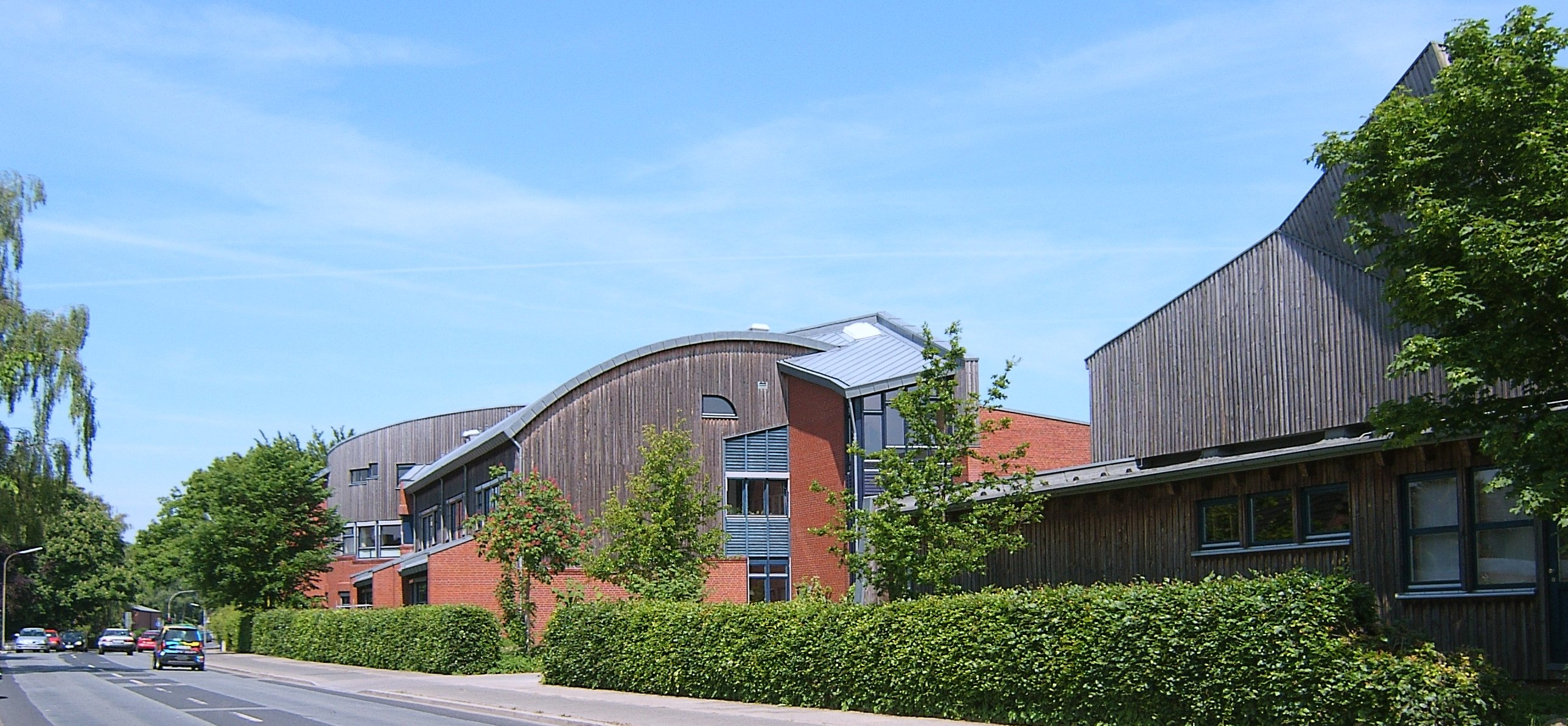 Kaltenkirchen, Waldorf-Schule